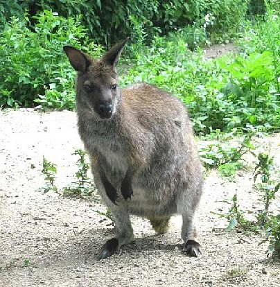 Wallaby